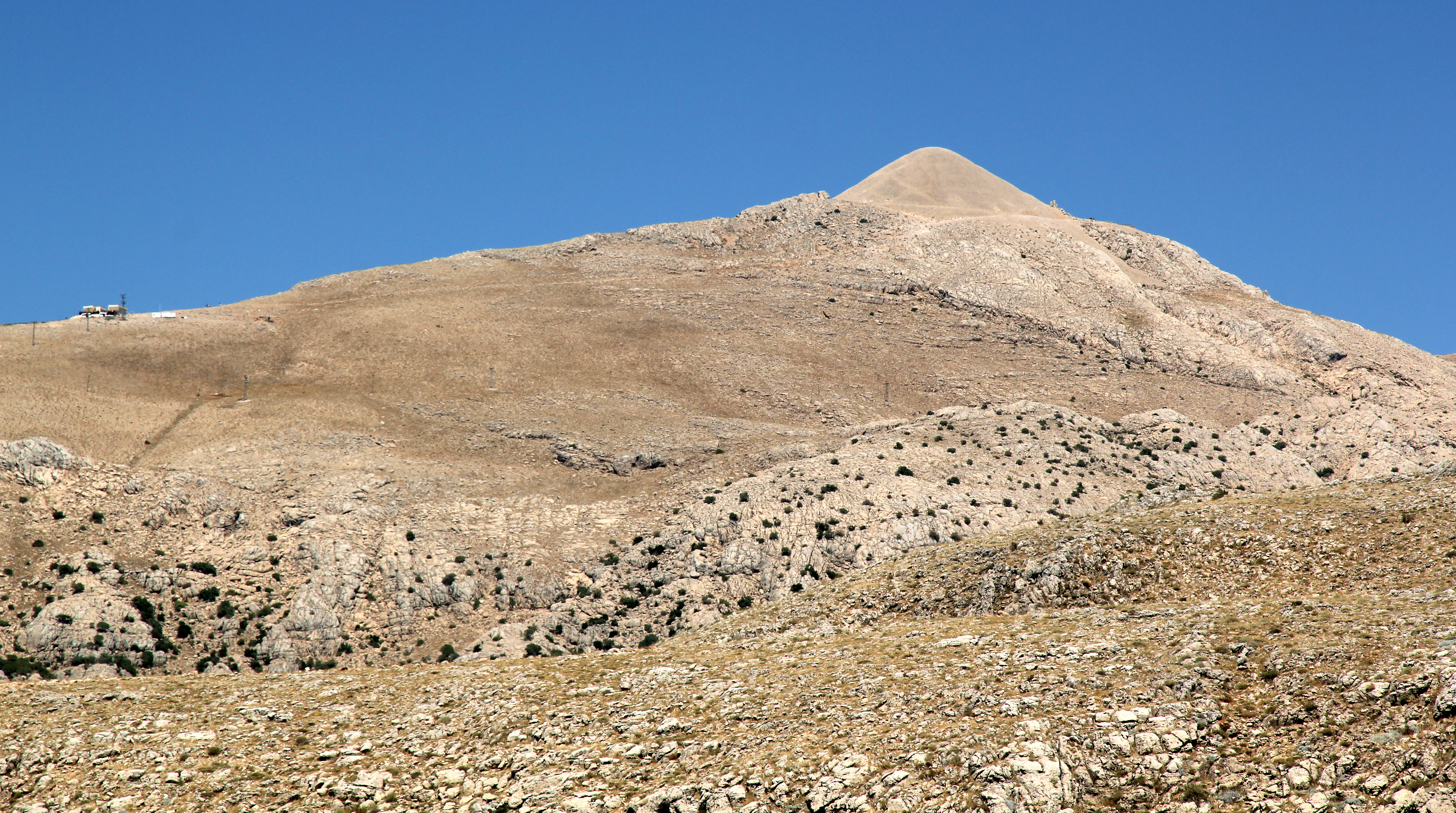 Nemrut Dağı, Südosttürkei, Tumulus von Süden, links Touristenzentrum